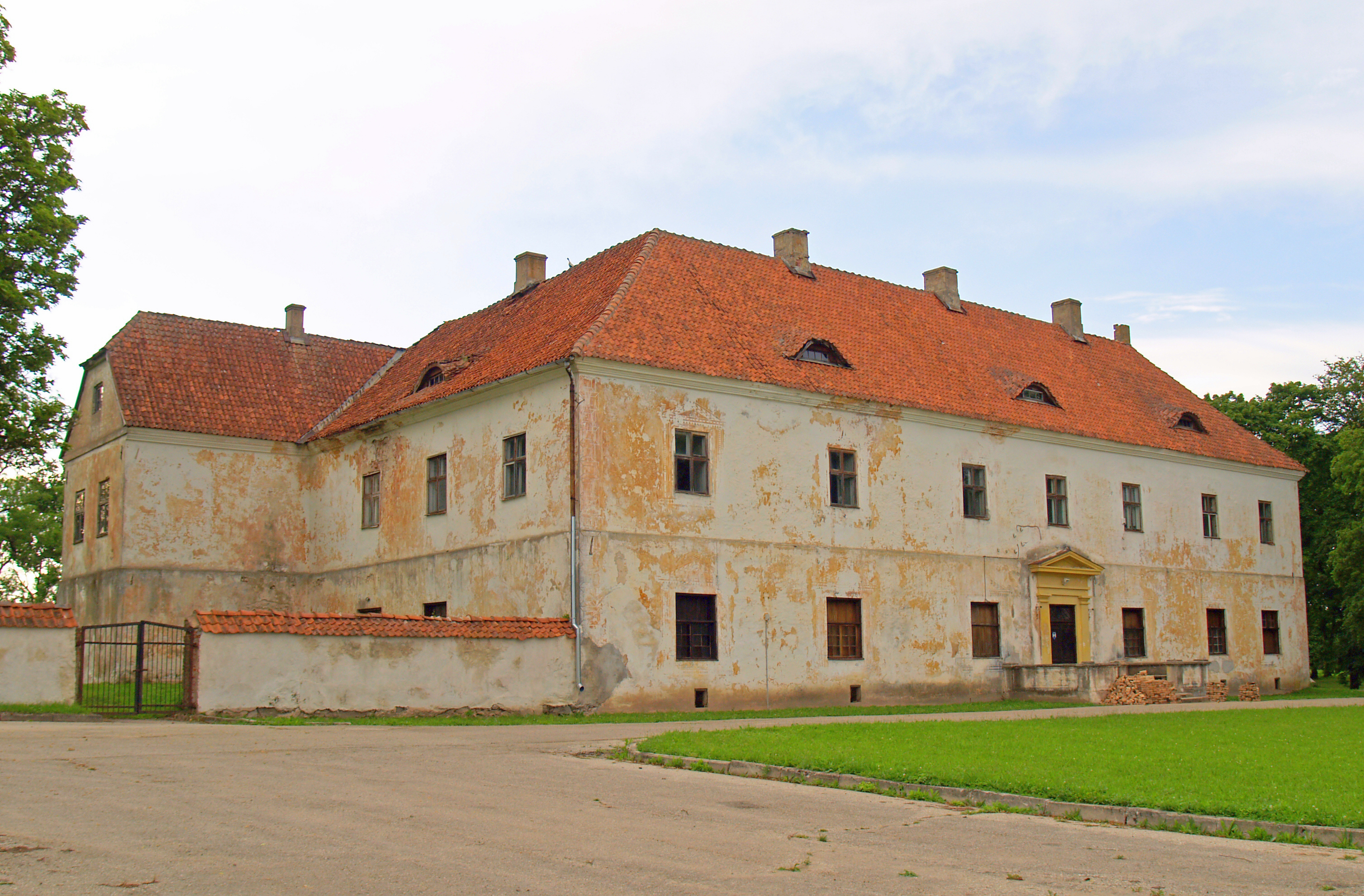 Nurmuiža (Palace Nurmuiza)